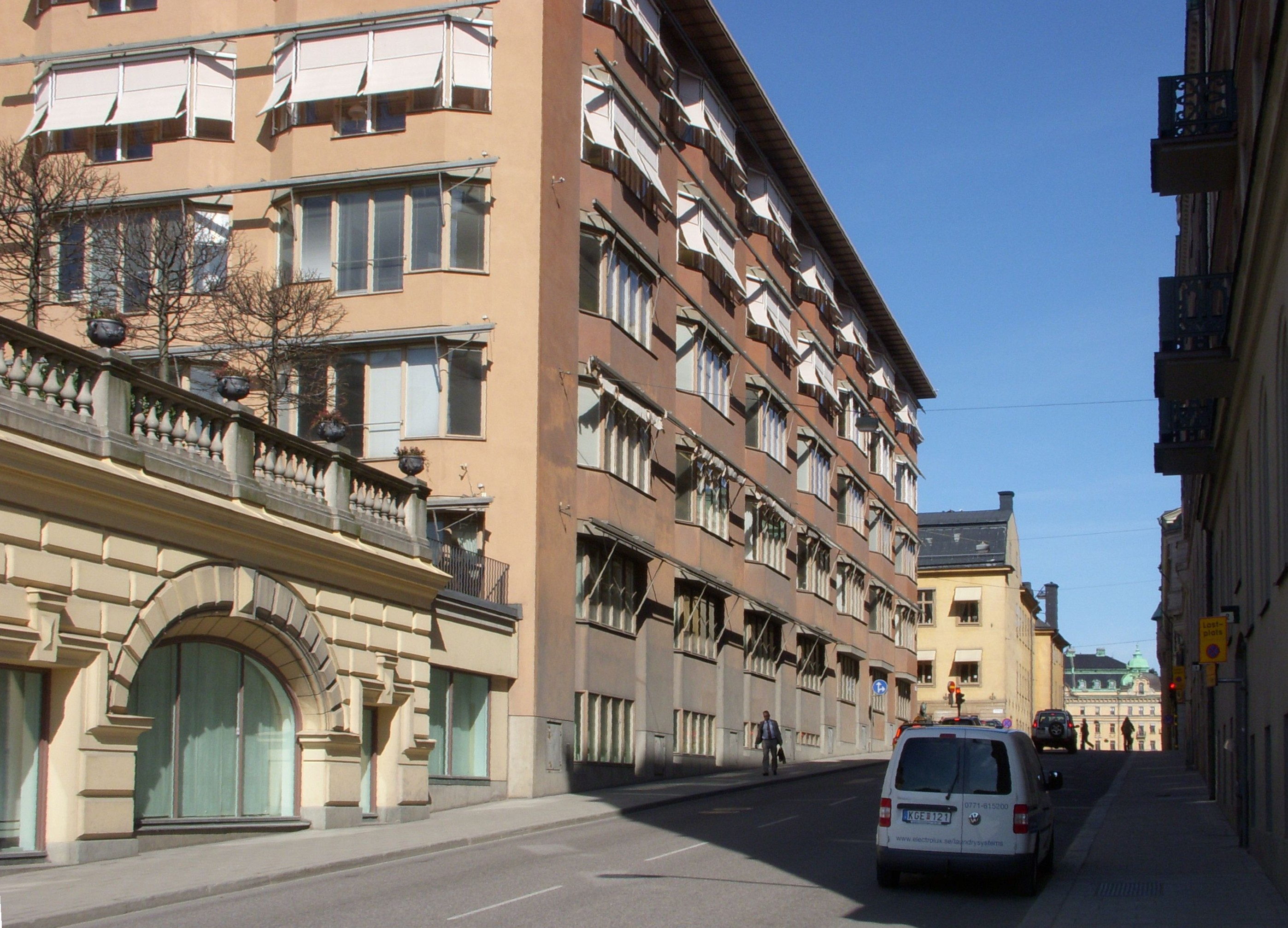 Stallgatan på Blasieholmen i Stockholm. Tillbyggnad av Fersenska Terassen från 1976. Arkitekt Carl Nyrén